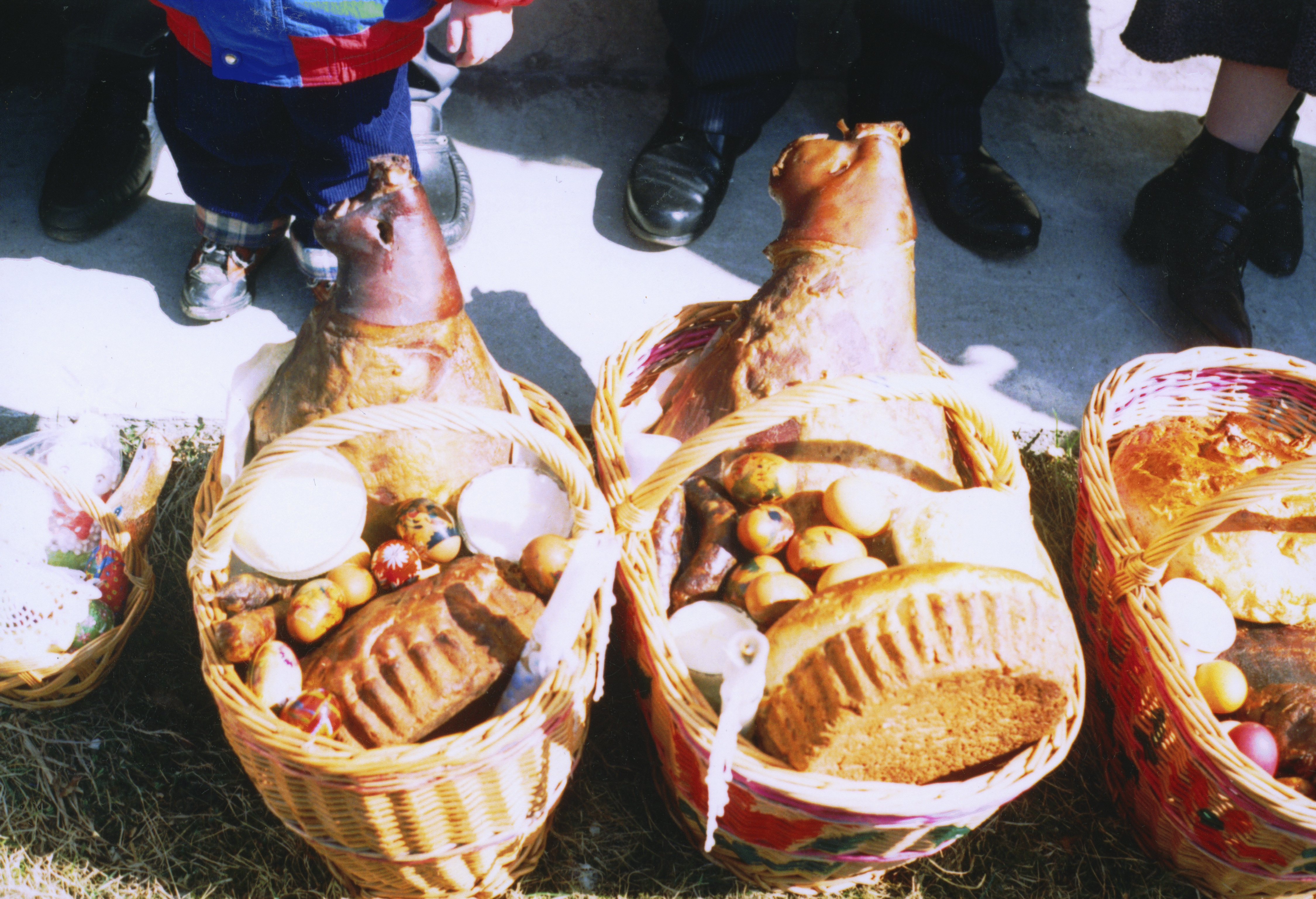 Košík s veľkonočnými jedlami na východnom Slovensku. Photo taken by Jozafát Vladimír Timkovič, OSBM